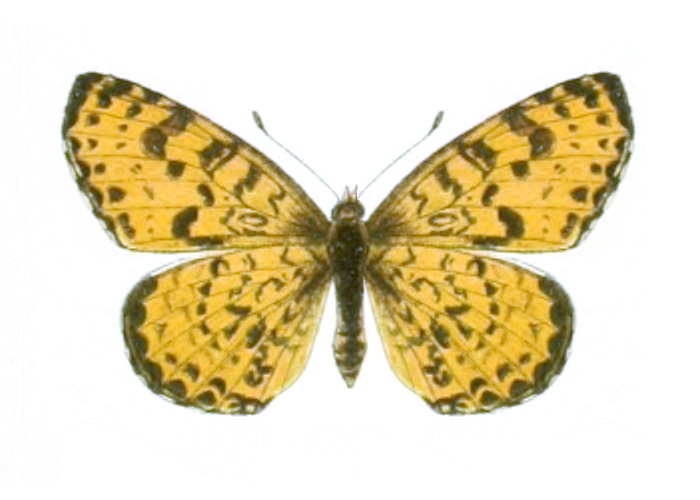 Melitaea didyma O. f. pekinensis Seitz = Melitaea didymoides pekinensis Seitz, [1909]